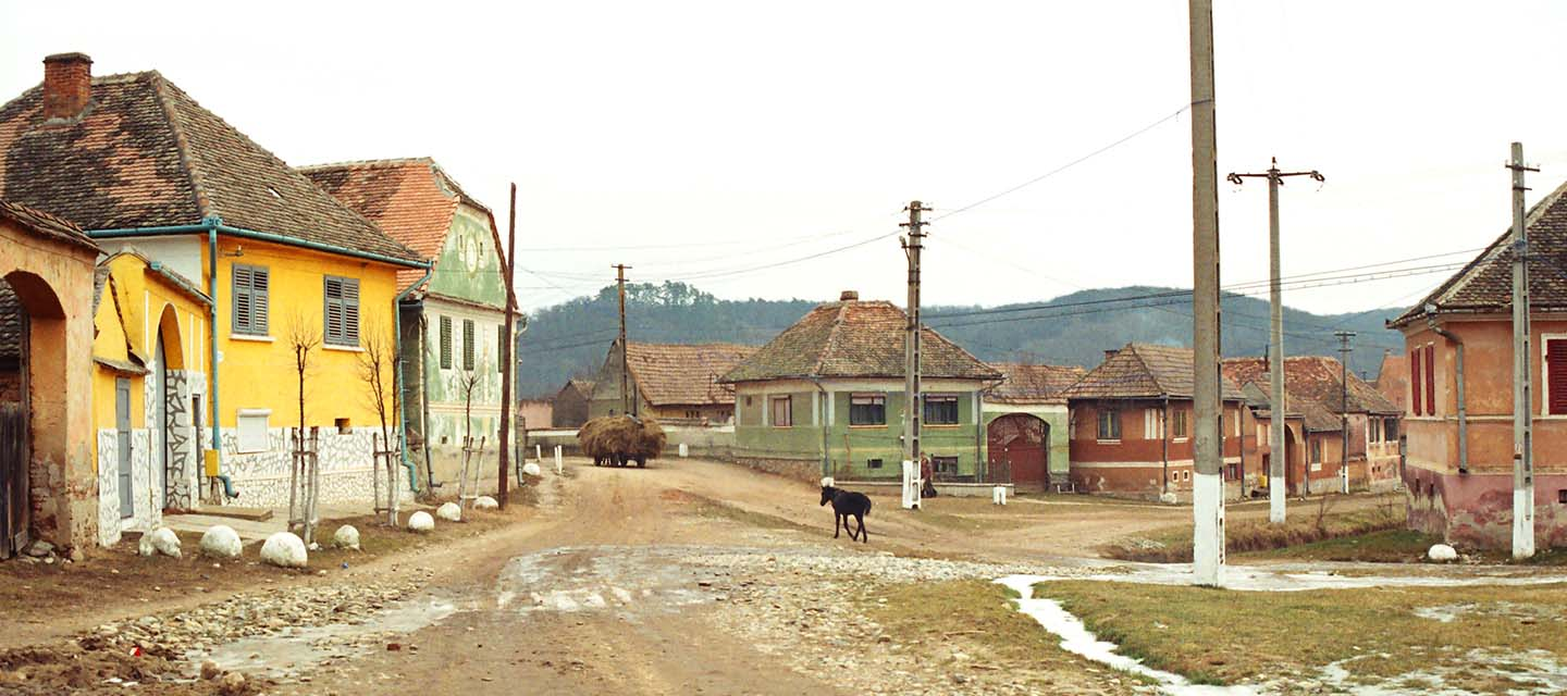 Ortskern von Kastenholz - Caşolţ